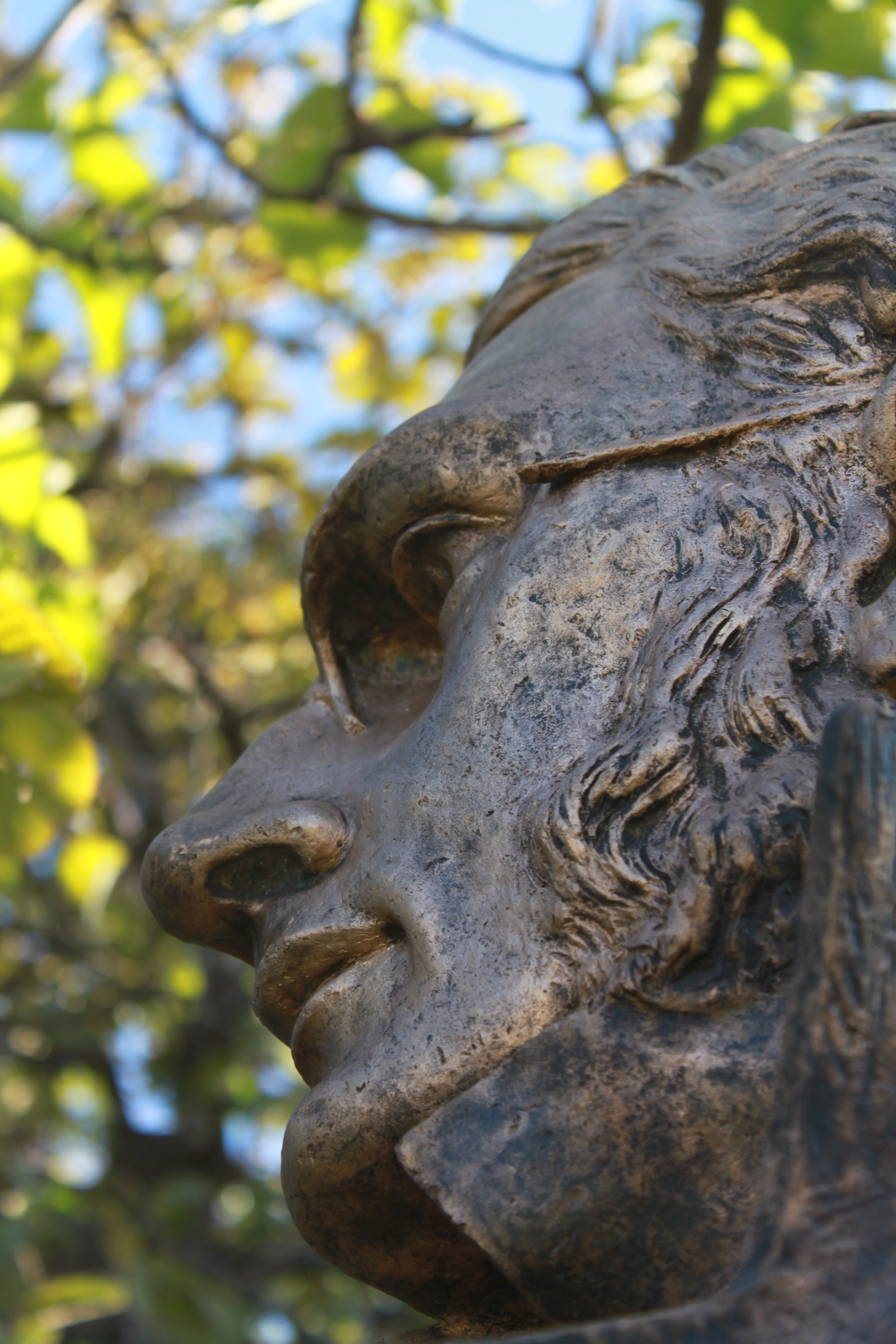 Busto de Peter Wilhelm Lund - Cemitério Dr. Lund - foto de Cleito Ribeiro -Lagoa Santa/MG